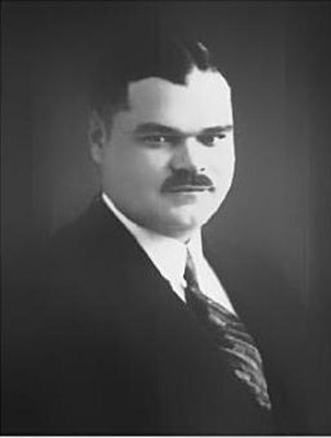 Петрігалла Петр: Міський староста Мукачева Петрігалла_Петр (1926–1931)З-Г-21-104-0149